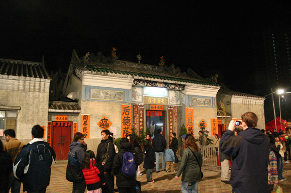 屯門后角天后廟